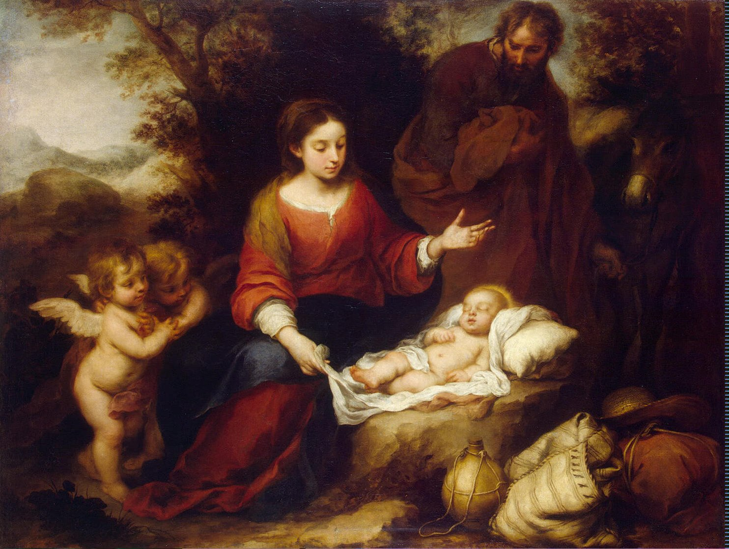 Descanso en la huida a Egipto pintura al óleo de Bartolomé Esteban Murillo, se conserva en el museo del Hermitage en San Petersburgo 180 x 136 cm